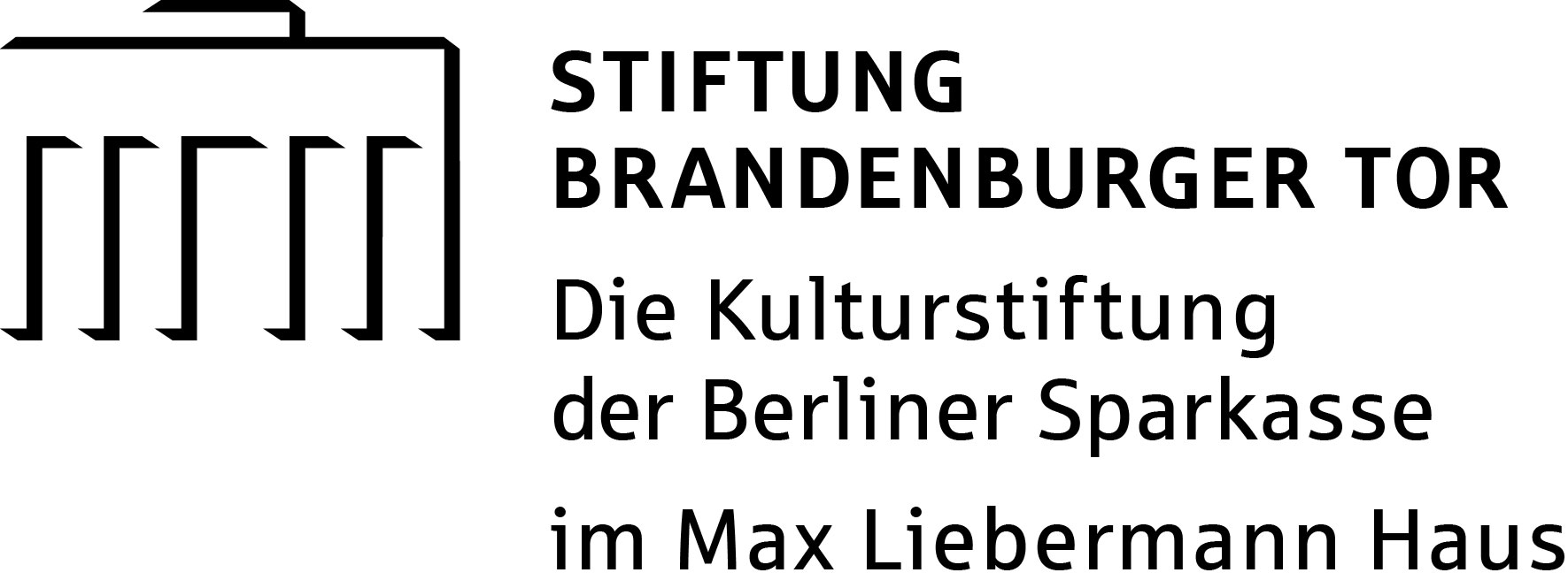 Logo Stiftung Brandenburger Tor